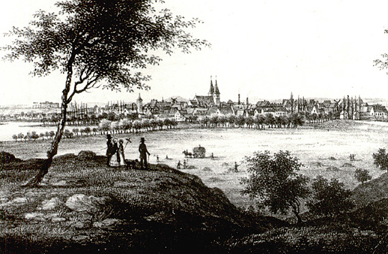 Blick auf Calbe von Nordosten (Mägdesprung)